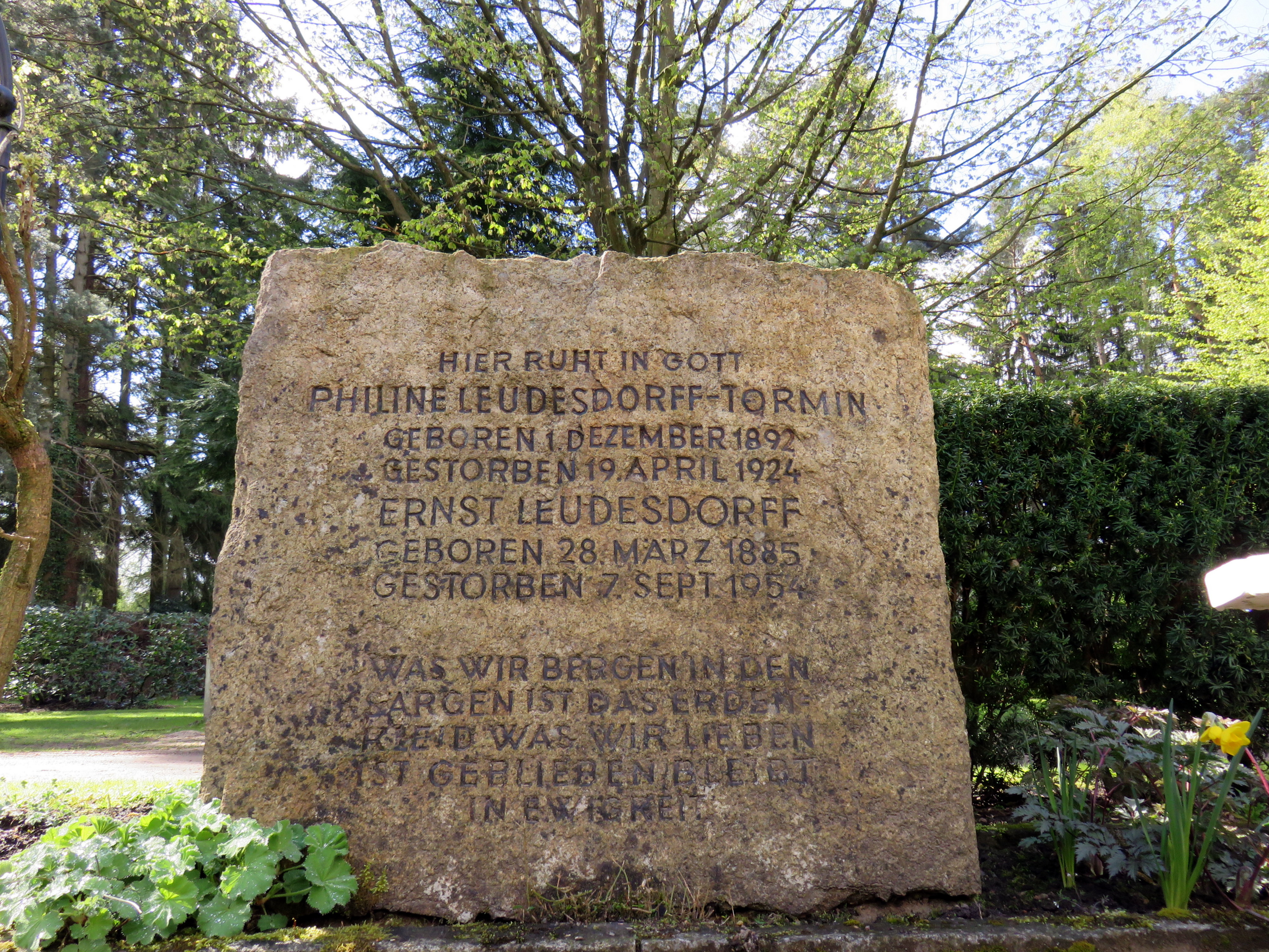 Historischer Grabstein der Theaterschauspielerin Philine Leudesdorff-Tormin im Bereich des Gartens der Frauen auf dem Ohlsdorfer Friedhof in Hamburg-Ohlsdorf.Ursprünglicher Standort AD 16, 158-9 (oberhalb Nordteich): Barbara Leisner, Heiko K. L. Schulze, Ellen Thormann: Der Hamburger Hauptfriedhof Ohlsdorf. Geschichte und Grabmäler, Verlag Hans Christians, Hamburg 1990, ISBN 3-7672-1060-6, Seite 142, Kat. 962.